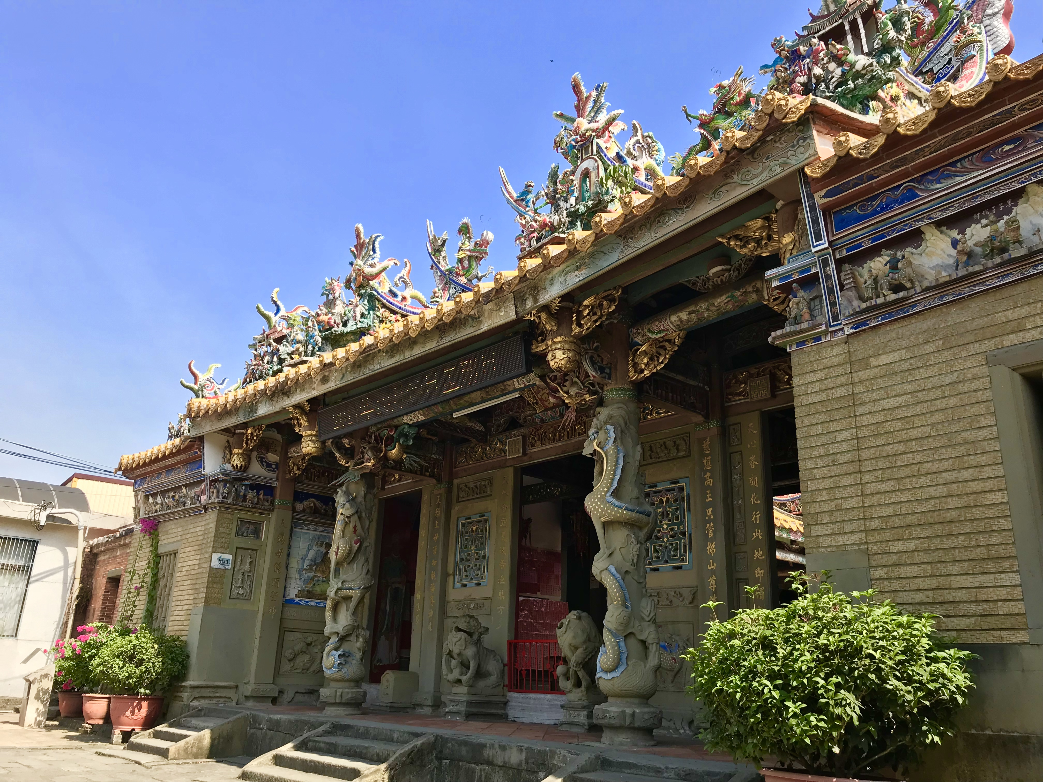 北埔慈天宮斜照